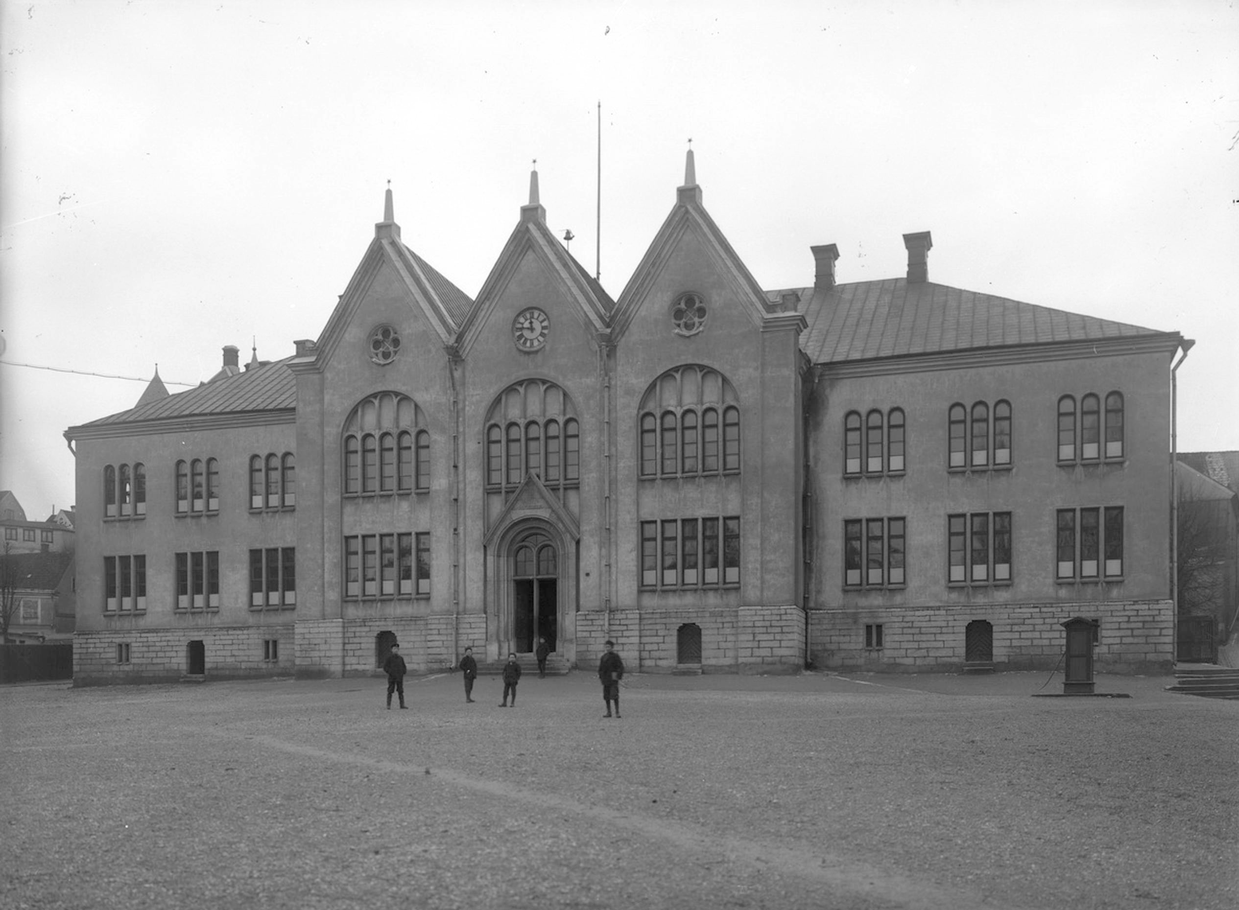 Högre Allmänna Läroverket i Visby 1905